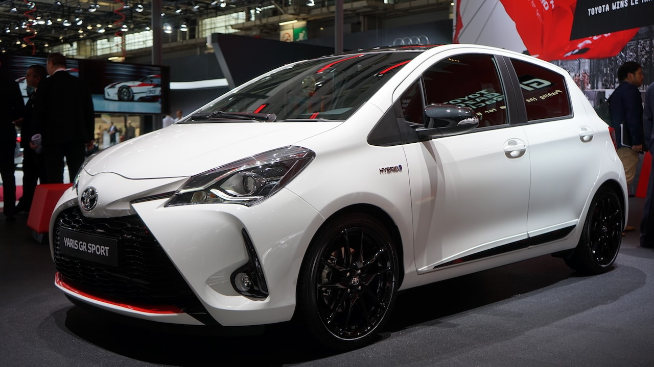 Toyota Yaris GR Sport na Paris Moto Show 2018